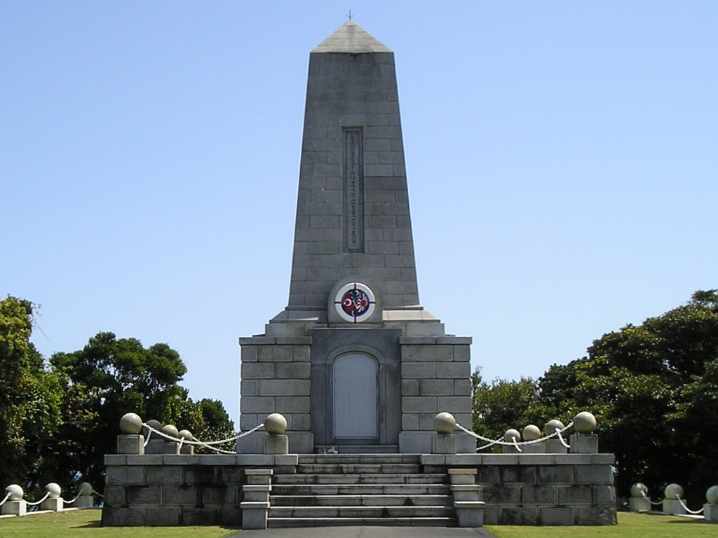 和歌山県ja:串本町（紀伊大島）にある「エルトゥールル号遭難慰霊碑」。※参考：エルトゥールル号遭難事件